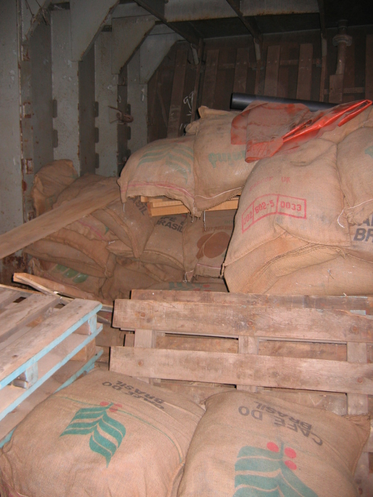 Ekspozyzycja na statku muzeum MS Cap San Diego - Hamburg